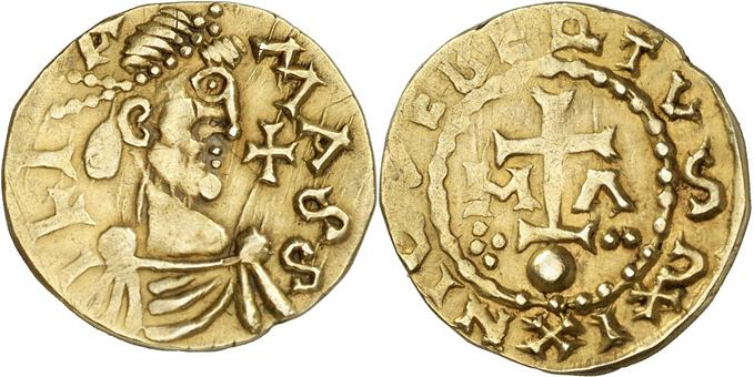 Solidus de 20 siliques émis par Childebert l'Adopté (656-662). Avers : MASS/ILI/A buste diadémé et drapé à droite, devant, une croix. Revers : XNILVEBERTVS RI croix au pied potencé, accostée des lettres M et A, posée sur un globe entre deux séries de points : quatre d’un côté pour X et deux de l’autre, (résidu des chiffres de valeur), dans un cercle perlé.